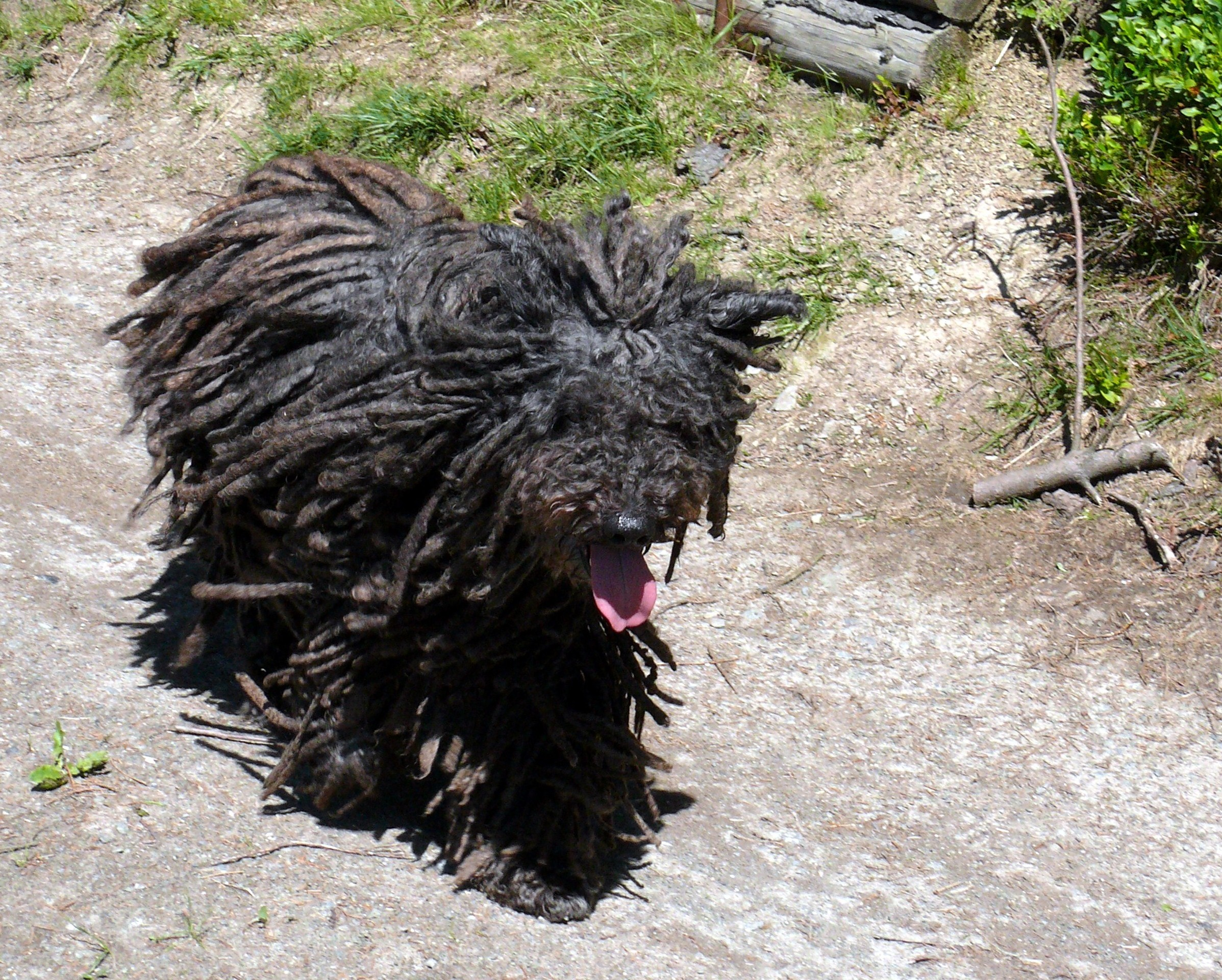 Puli